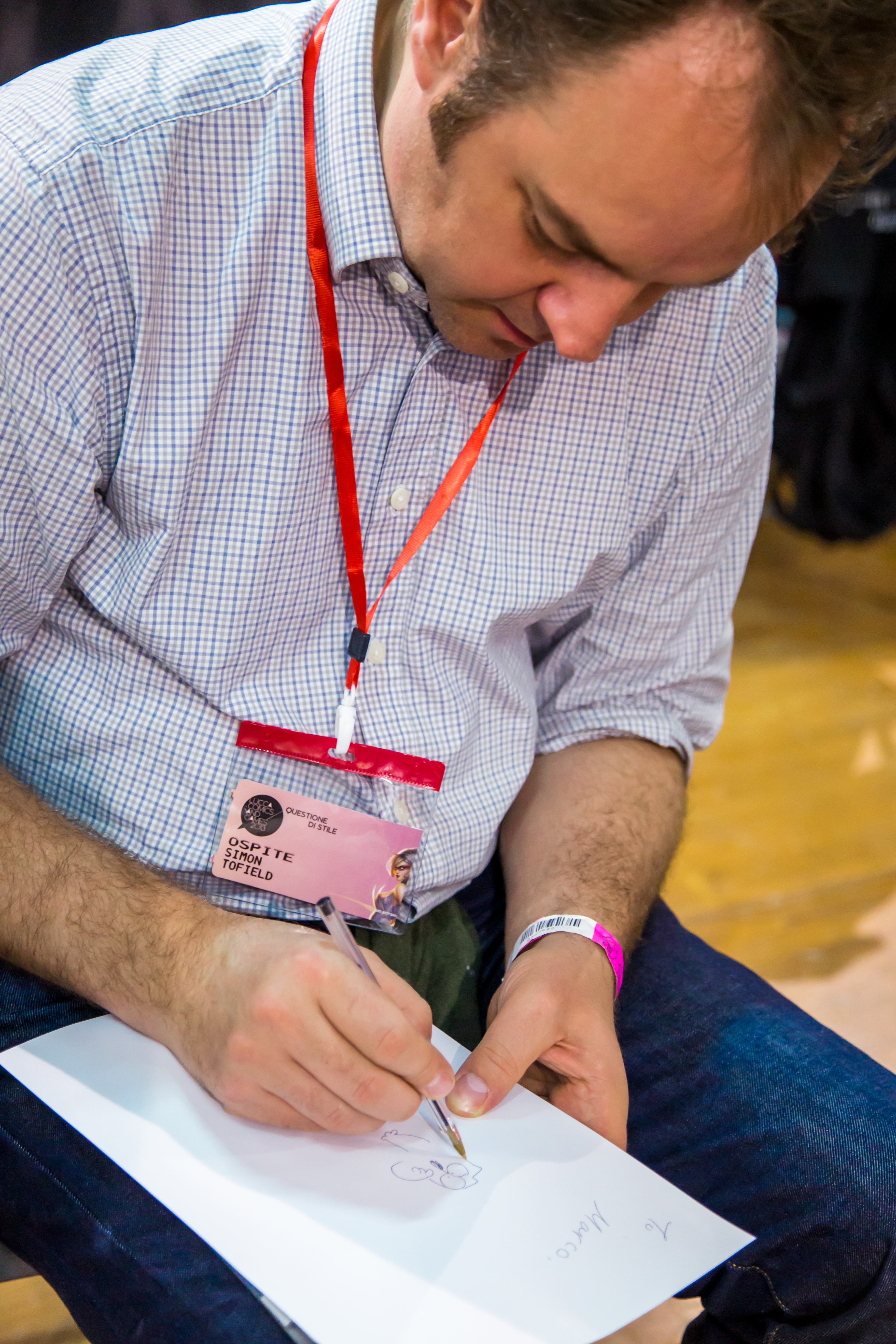 Simon Tofield, autore della serie animata Simon's cat ospite al Lucca Comics & Games 2013